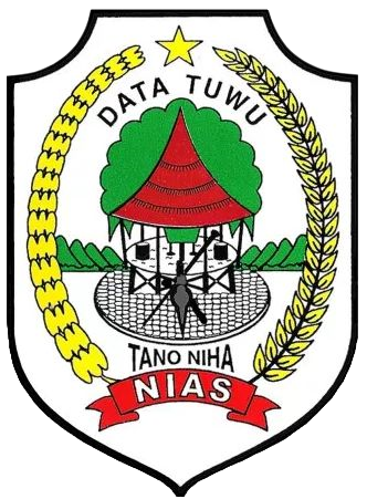 Nias